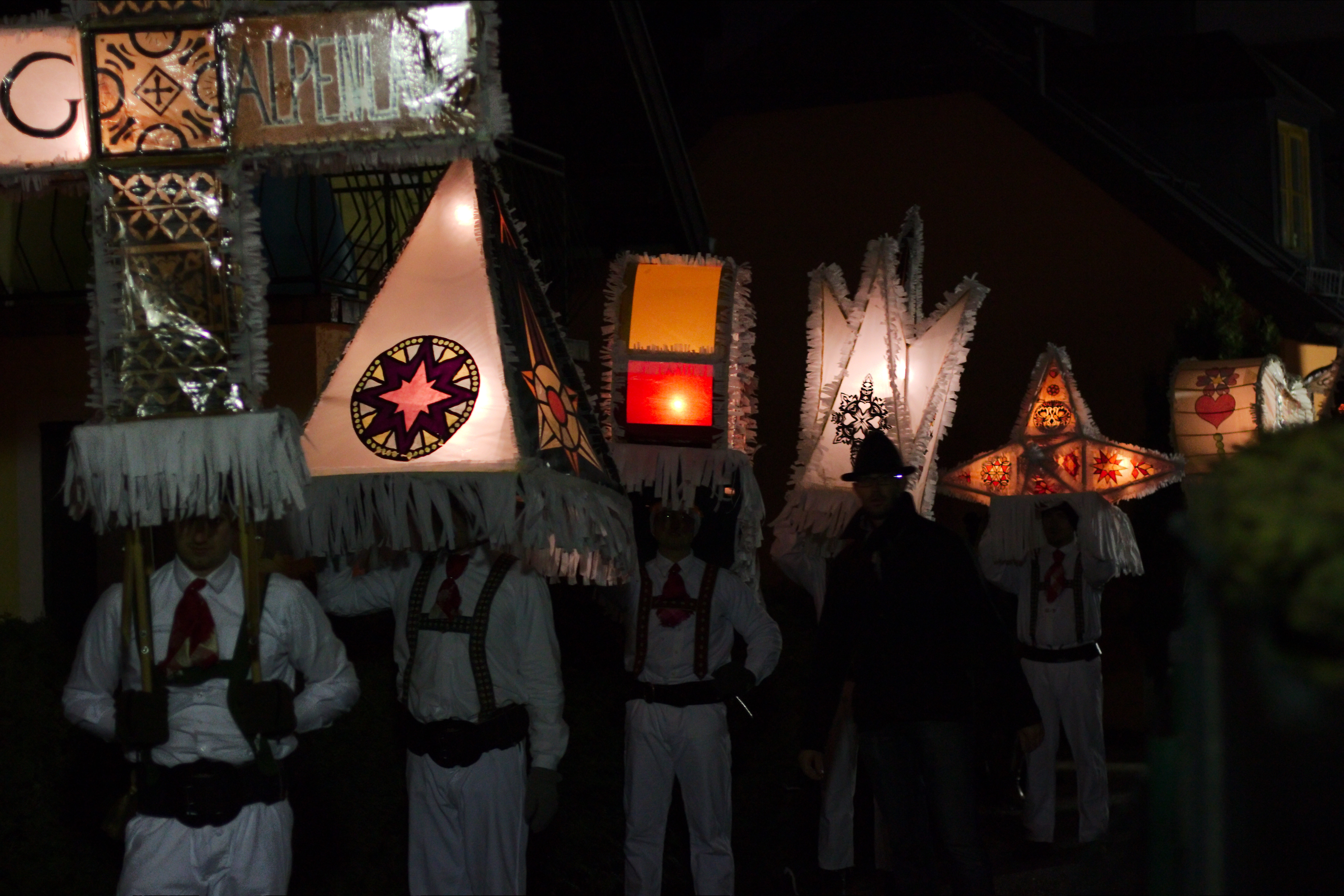 Glöckler in Salzburg, Austria 2013